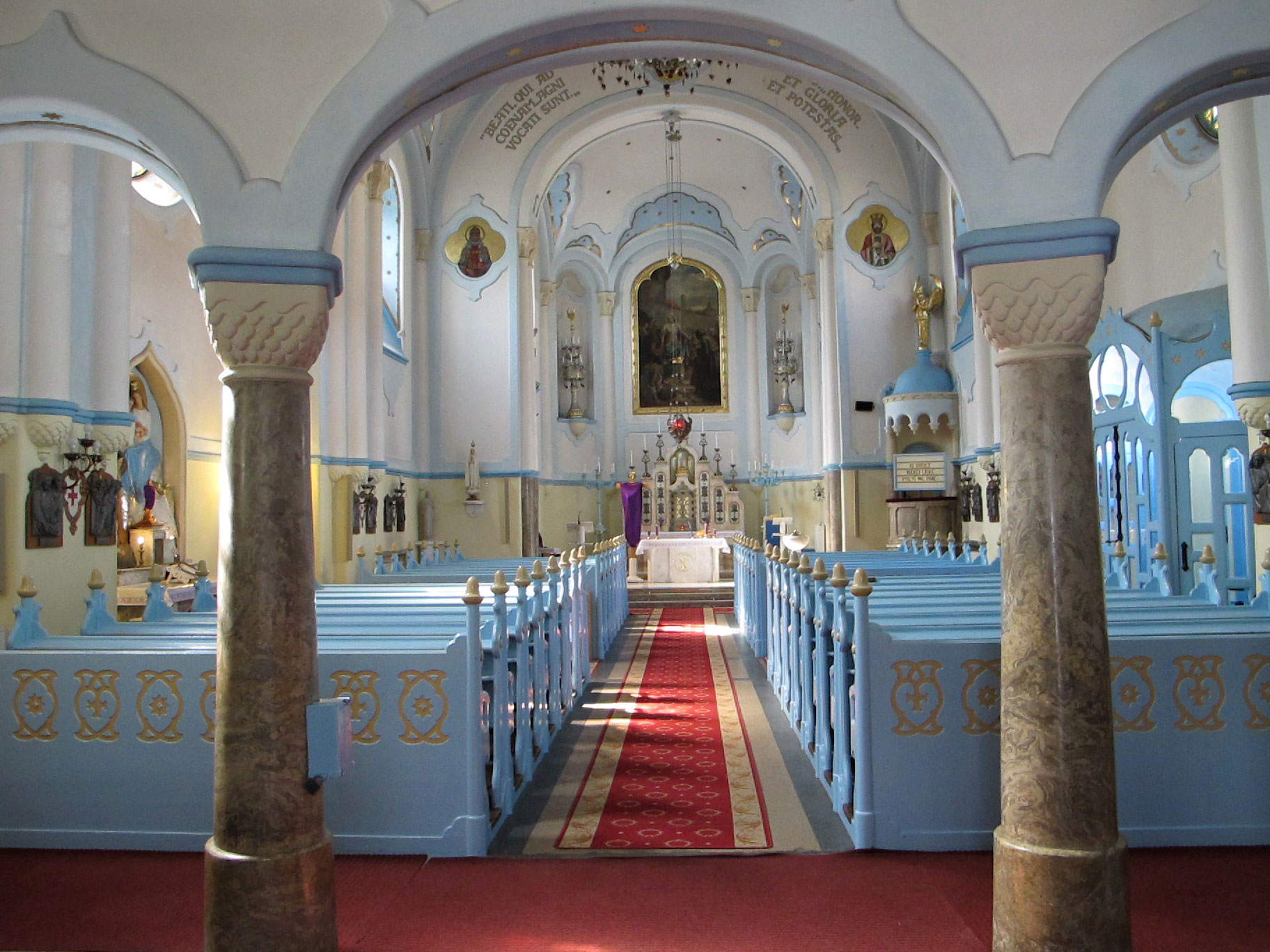 La Iglesia Azul - Bratislava - República Eslovaca Oficialmente conocida como la Iglesia de Santa Isabel de Hungría, pero comúnmente conocida simplemente como "la Iglesia Azul" por razones obvias, esto es lo más atractivo de Bratislava edificio de art nouveau. Su estilo, a veces conocida como la secesión de Hungría, se repite en la escuela primaria cercana en Grosslingova Street. Ambos fueron diseñados por el arquitecto Edmund Lechner Budapest y construido en el siglo XX (la iglesia fue consagrada el 11 de octubre de 1913). Tanto el interior como exterior de la iglesia están pintadas en tonos de azul claro y azul decorada con mayólicas, incluso el techo está decorada con cerámica vidriada azul. La estructura incorpora una torre redonda 36,8 metros. Fuente y más información de Bratislava : visit.bratislava.sk/en/index.asp Blog de Bratislava : .es/ Ver el videofotos de Bratislava aquí : Fotografías